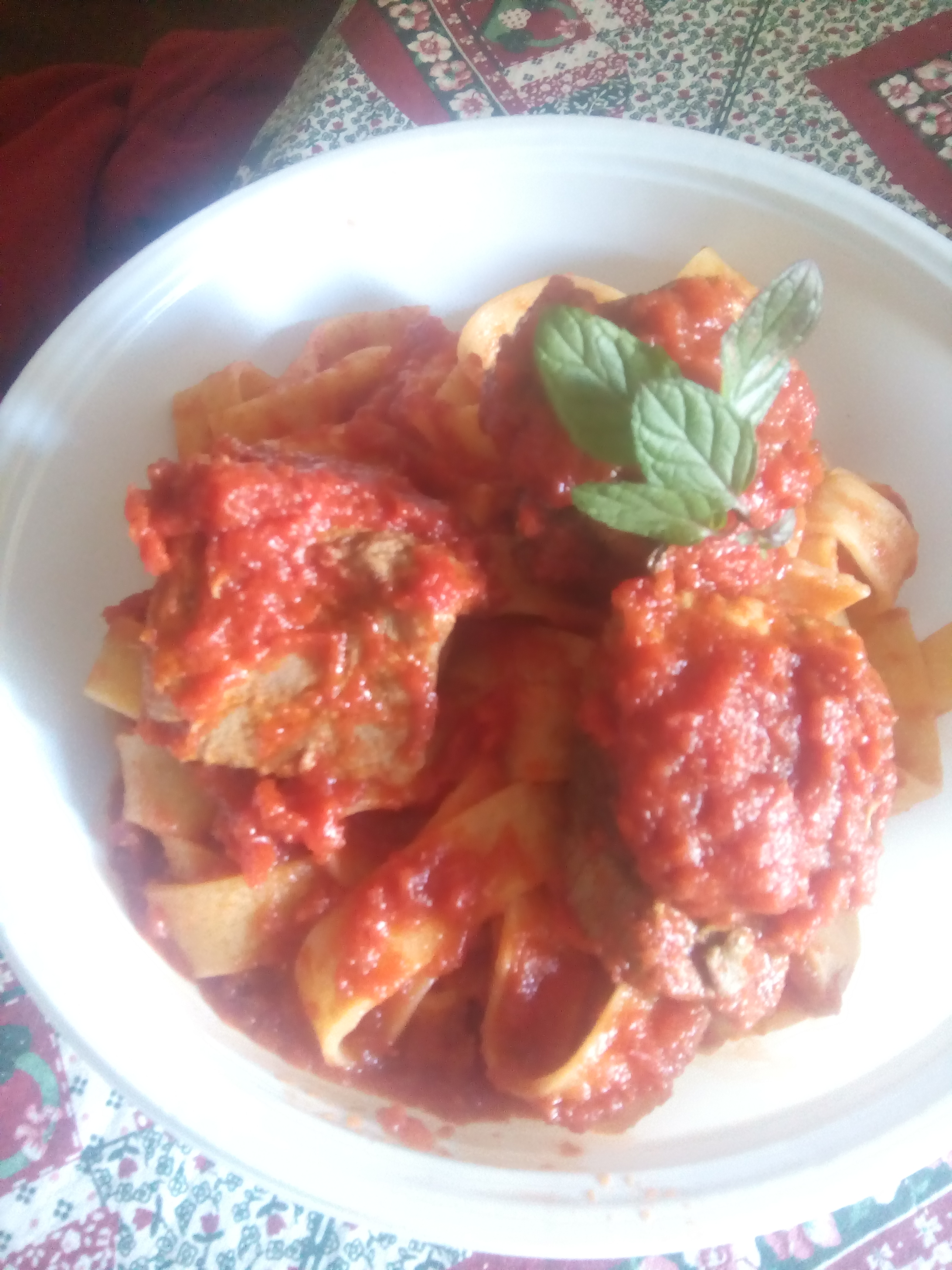 Tagliatelle con ragù di tonno rosso